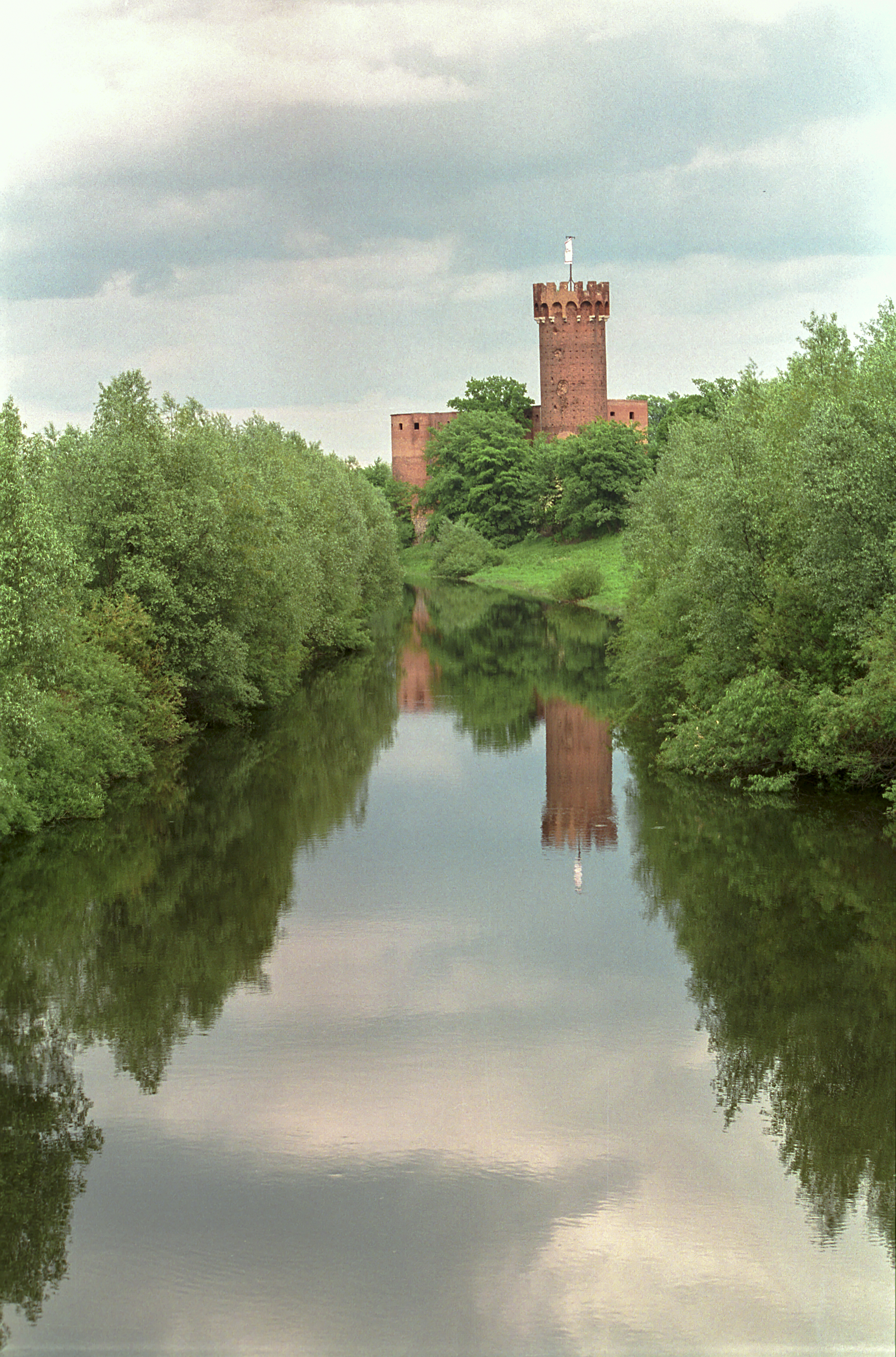 Poland, Swiecie Castle